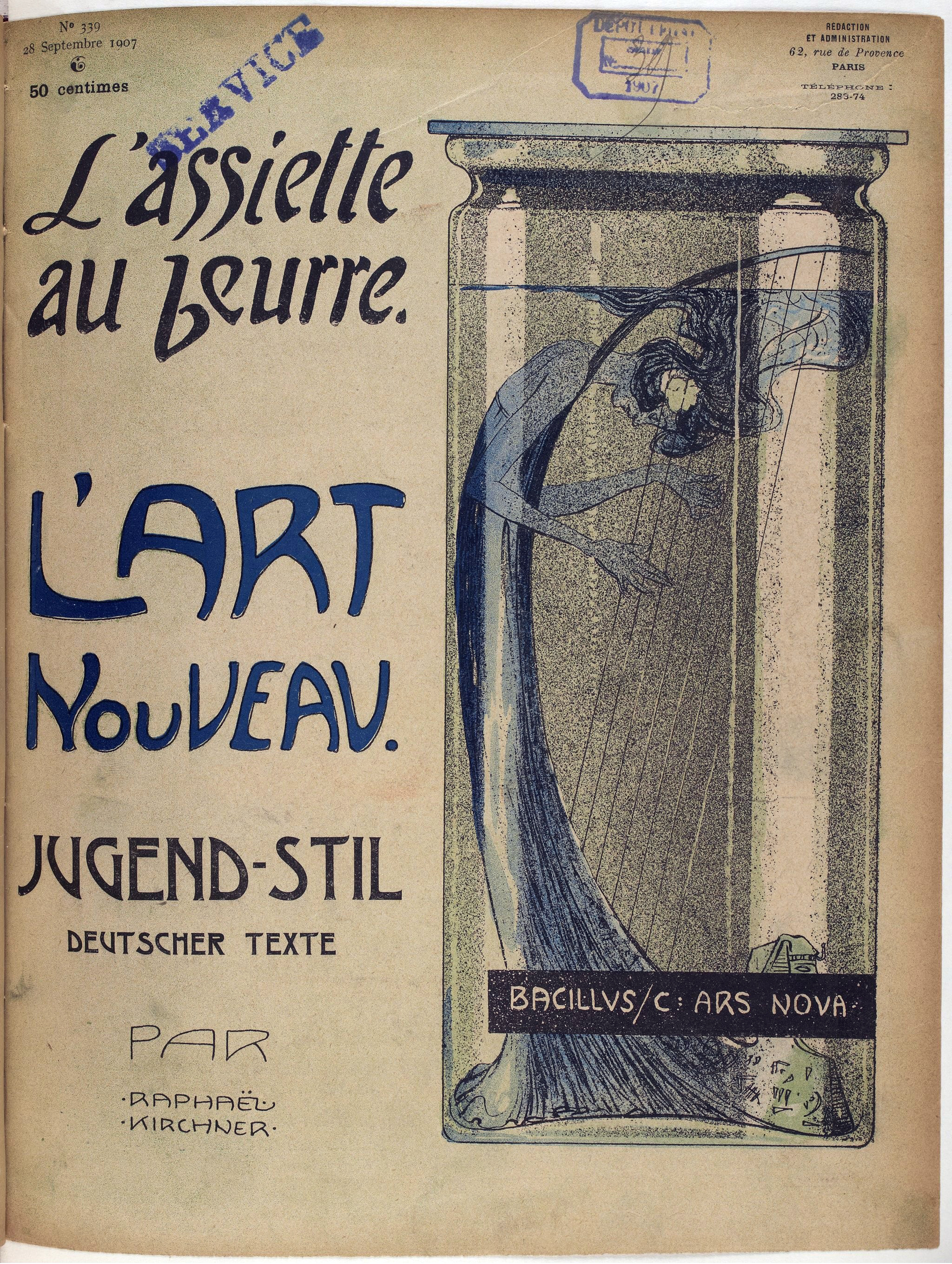 Cover